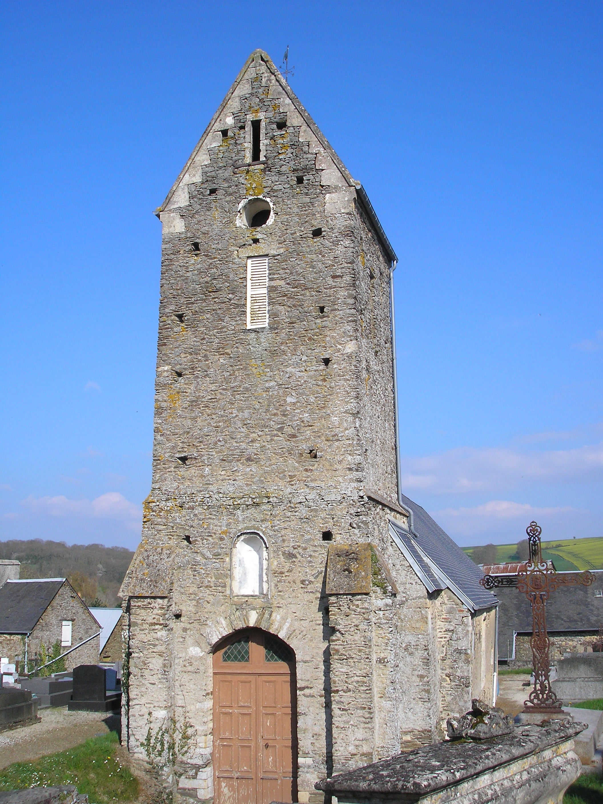 Bauquay (Normandie, France). L'église Saint-Mathieu.